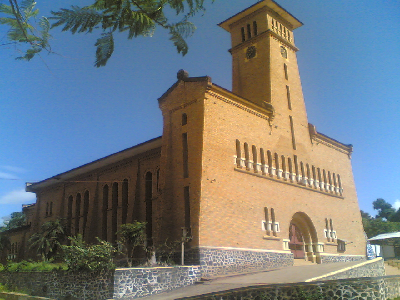 Cattedrale di Boma, nella Rep. Democratica del Congo (ex Zaire)